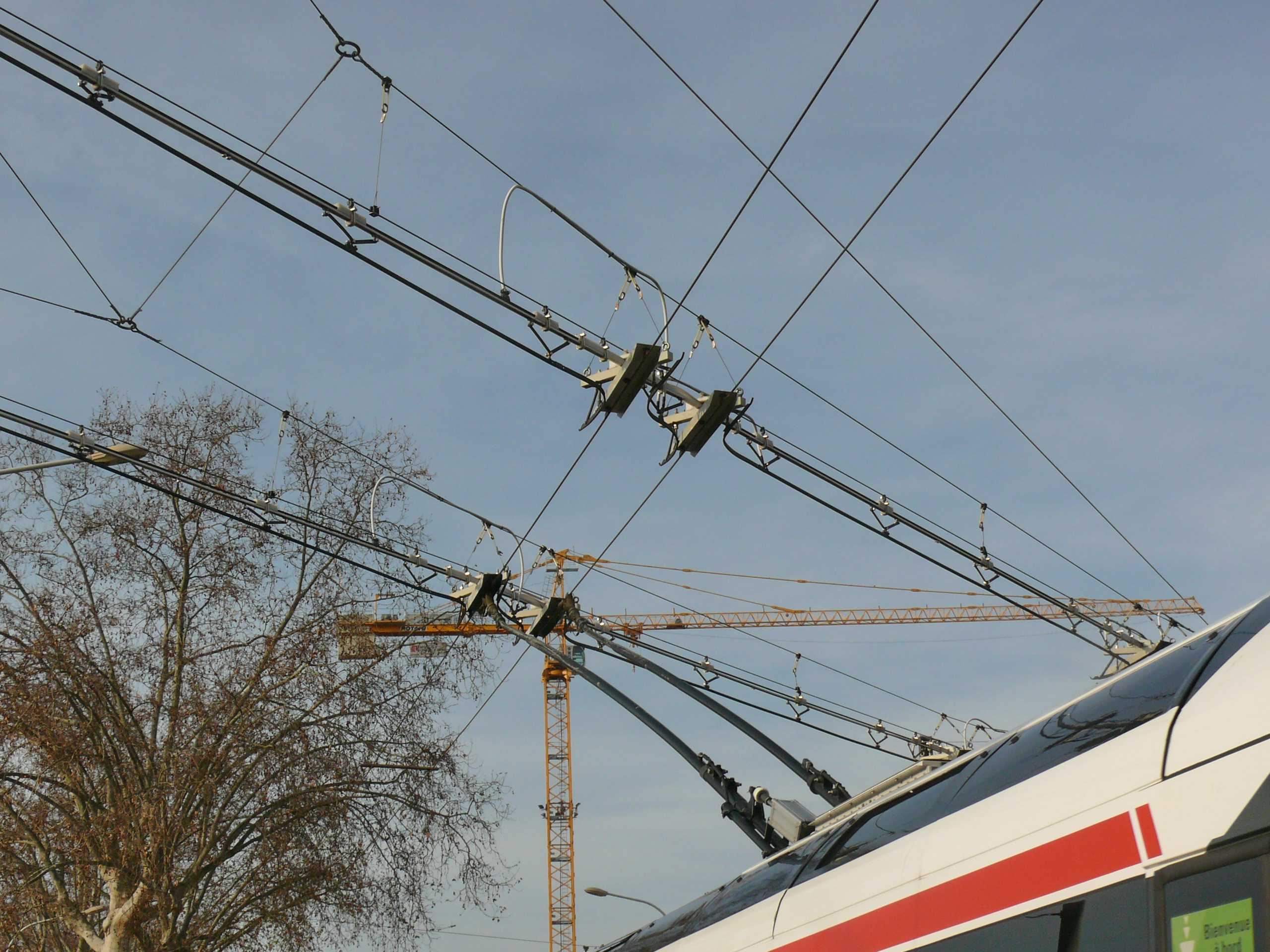 Croisement des lignes aériennes de contact entre la ligne de trolley C11 et la ligne de tramway T3 à Gare de l'Est, au passage des perches d'un trolley.